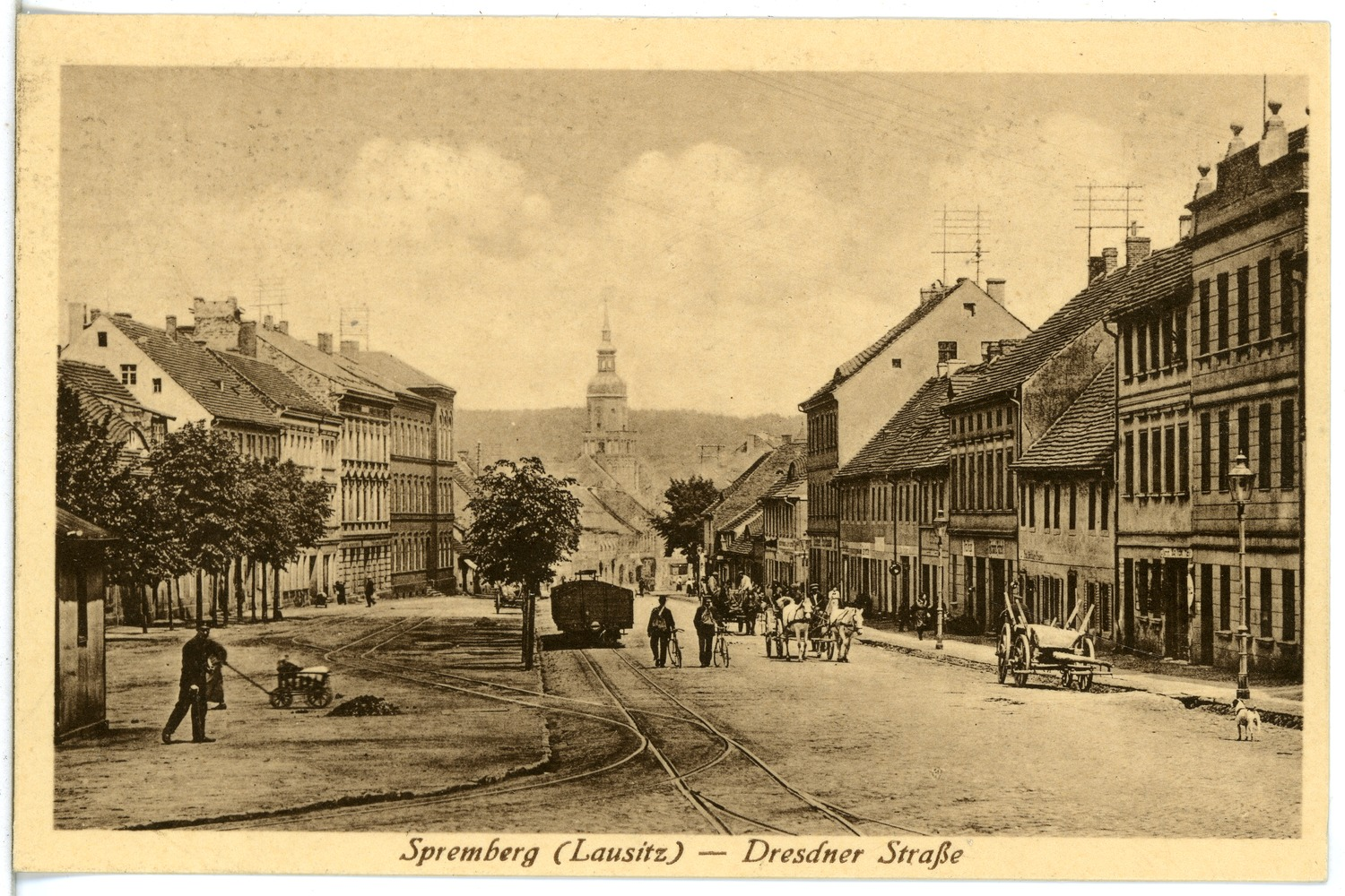 Spremberg; Dresdner Straße This postcard is from publisher Brück & Sohn in Meißen ( postcard has a unique number 20947 and is available in a higher resolution at the publisher. This images was uploaded in a cooperation project between Wikipedians and the publisher.